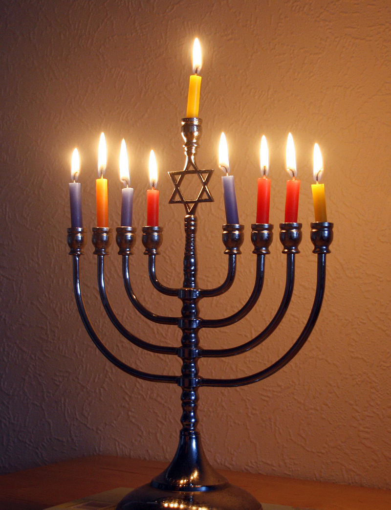 Menorá de Janucá